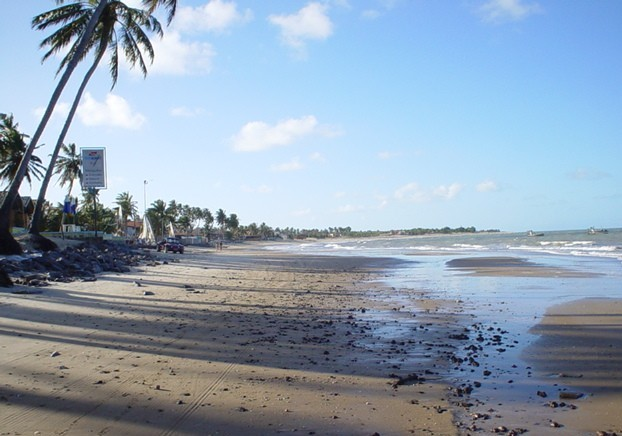 Vista praia Maracajau